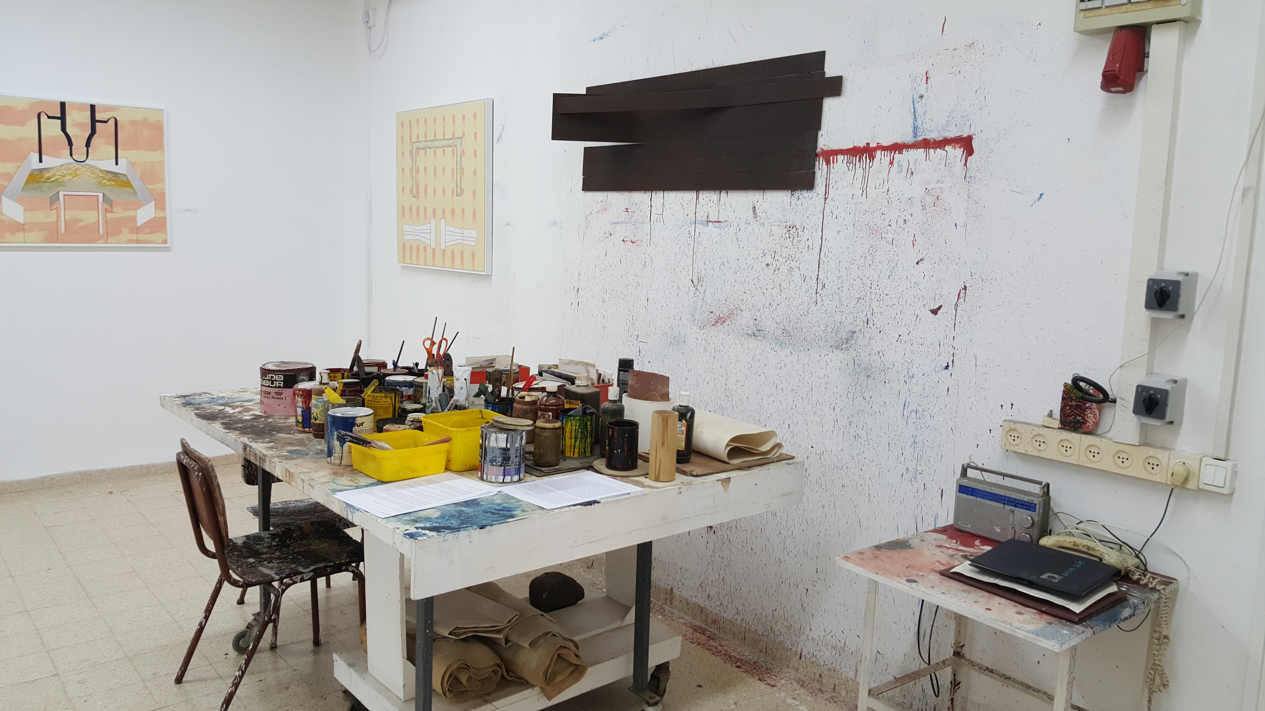 סביבת הציור של יחיאל שמי